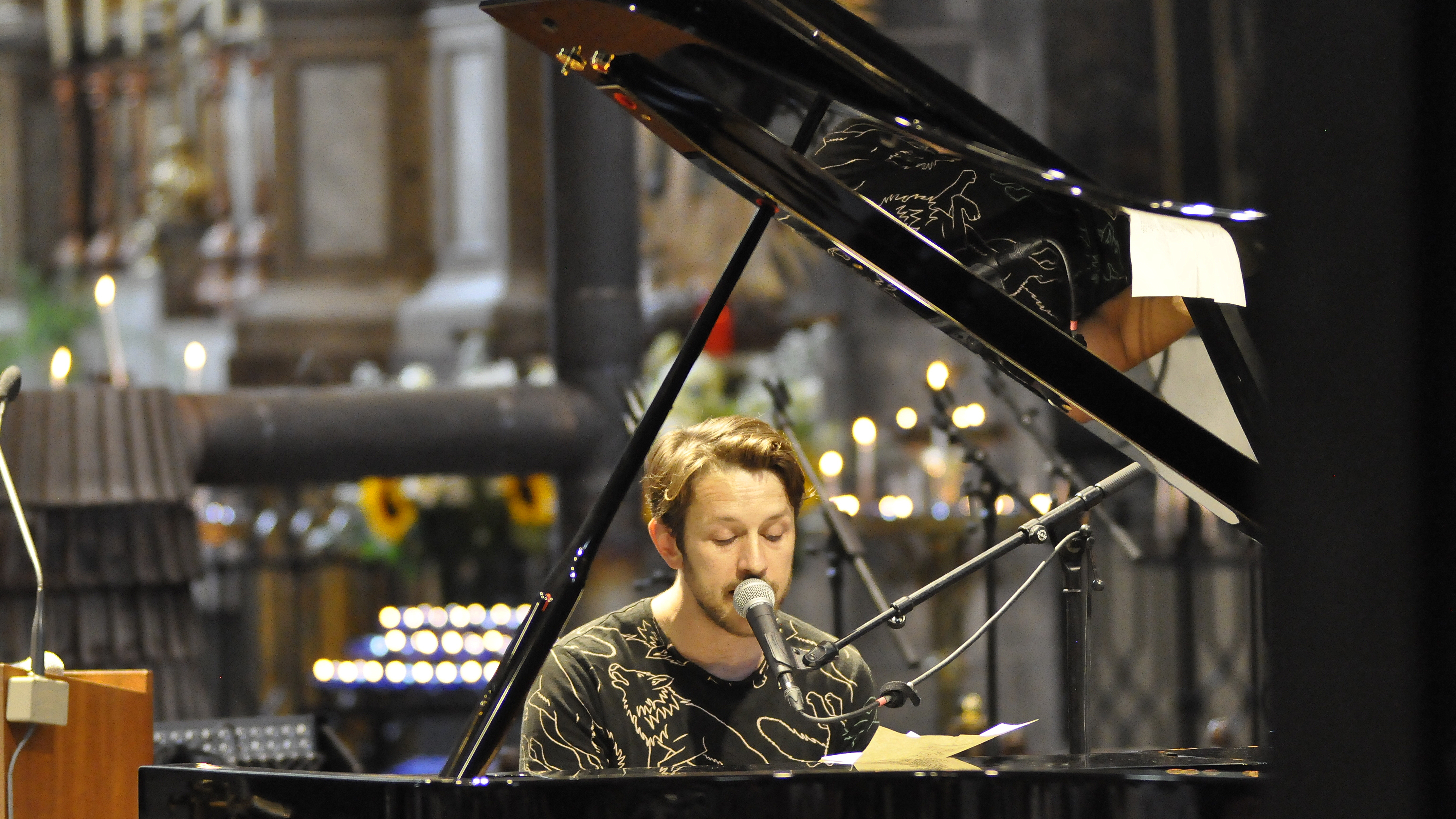 Gentse feesten 2018 Sioen 18-07-2018 This photo of immaterial heritage has been taken in the Flemish Region